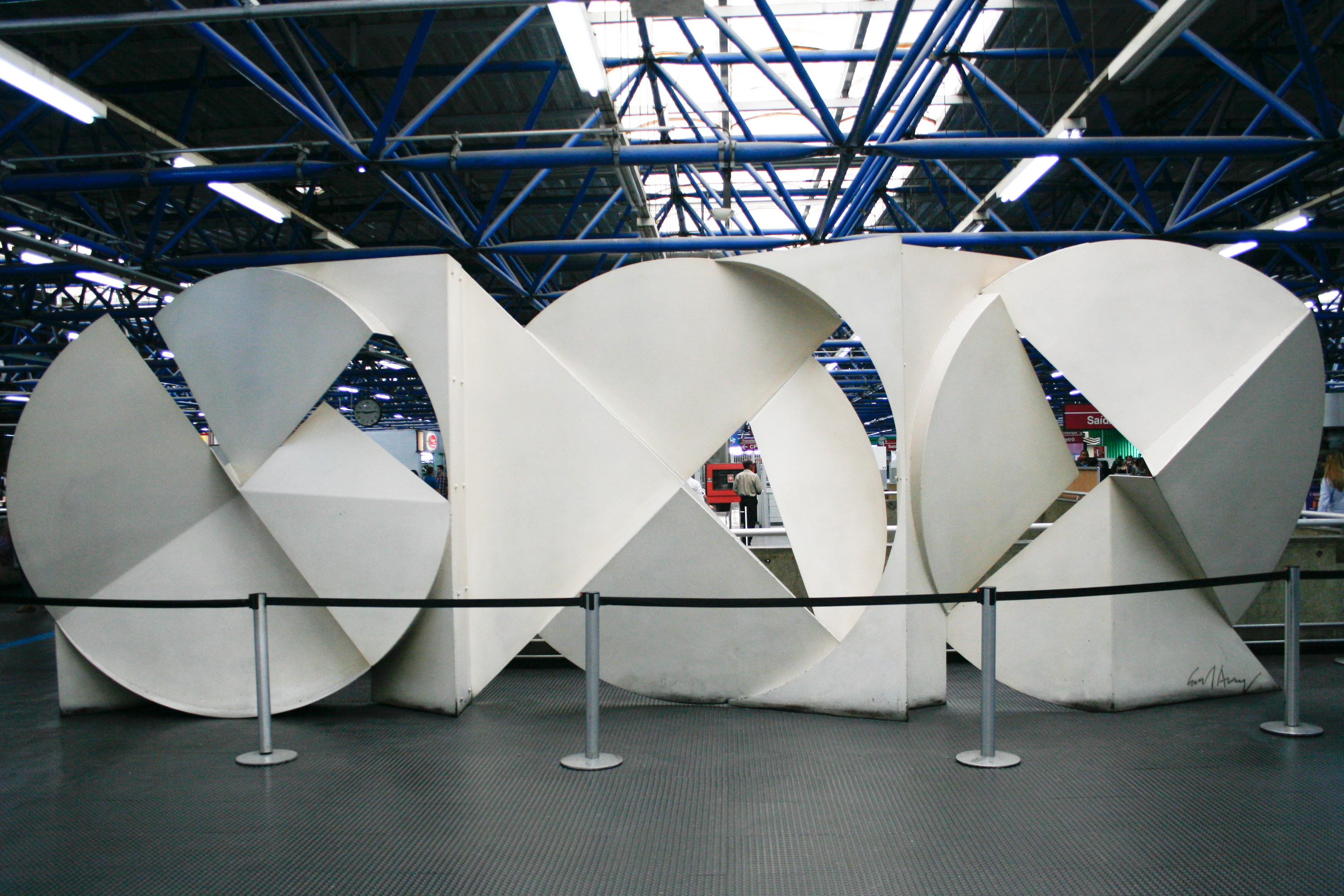 Estação de Metrô Barra Funda - Mezanino. Foto por Felipe Lavignatti para o Arte Fora do Museu (